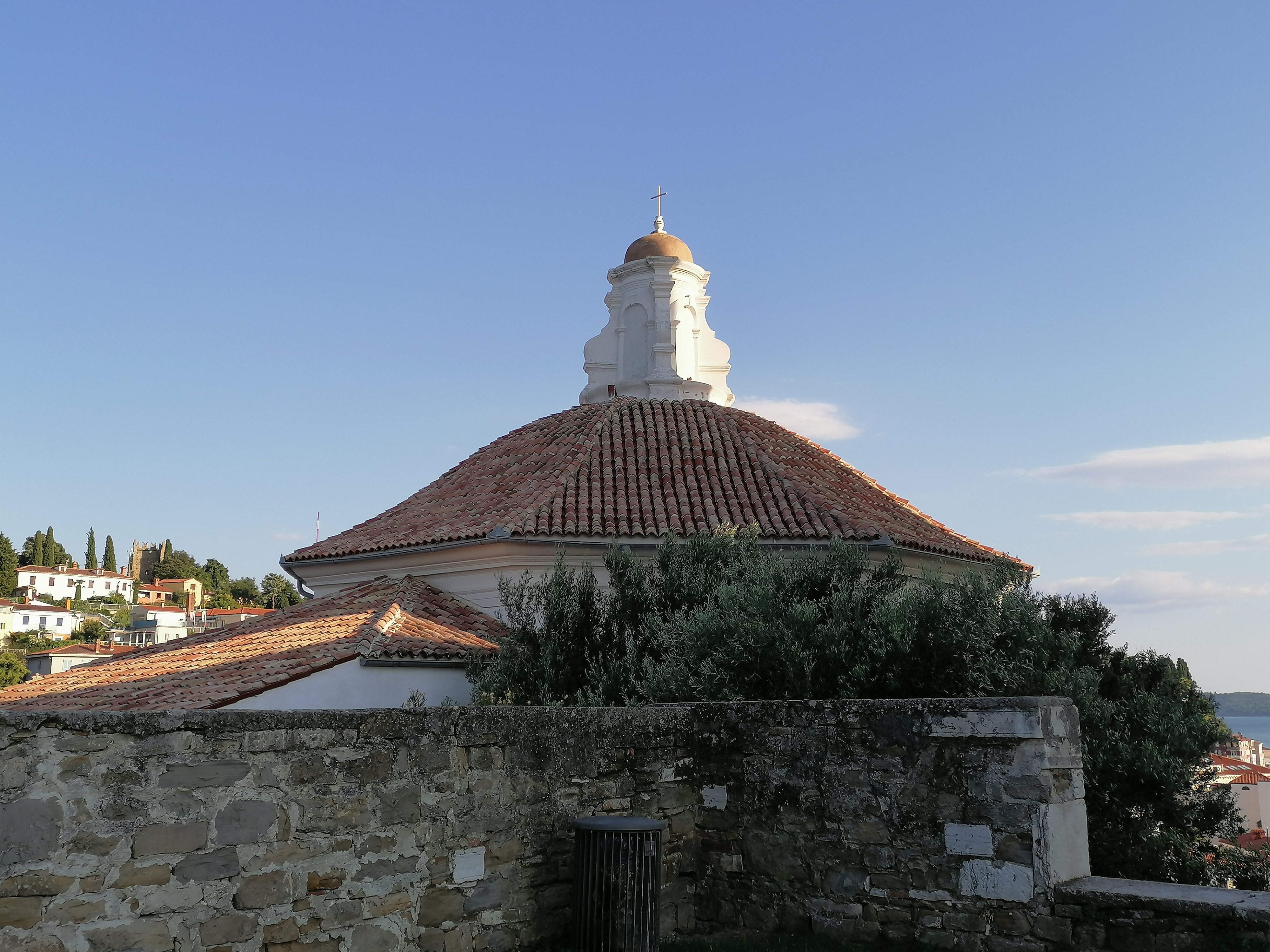 Krstilnica svetega Janeza Krstnika, Piran - Del cerkve sv. Jurija v Piranu